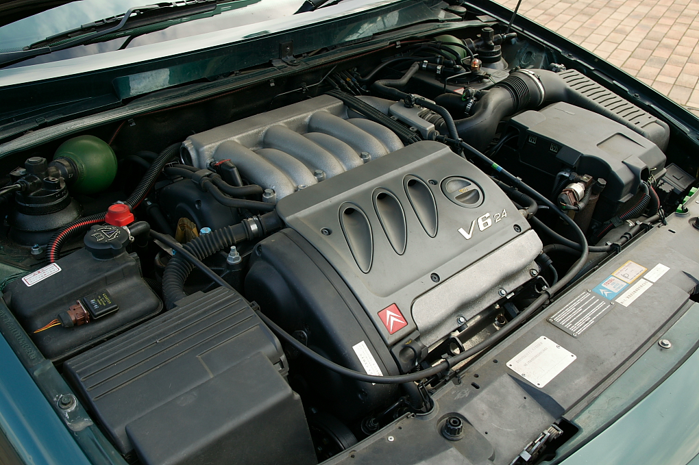 Citroën XM V6 24V petrol engine